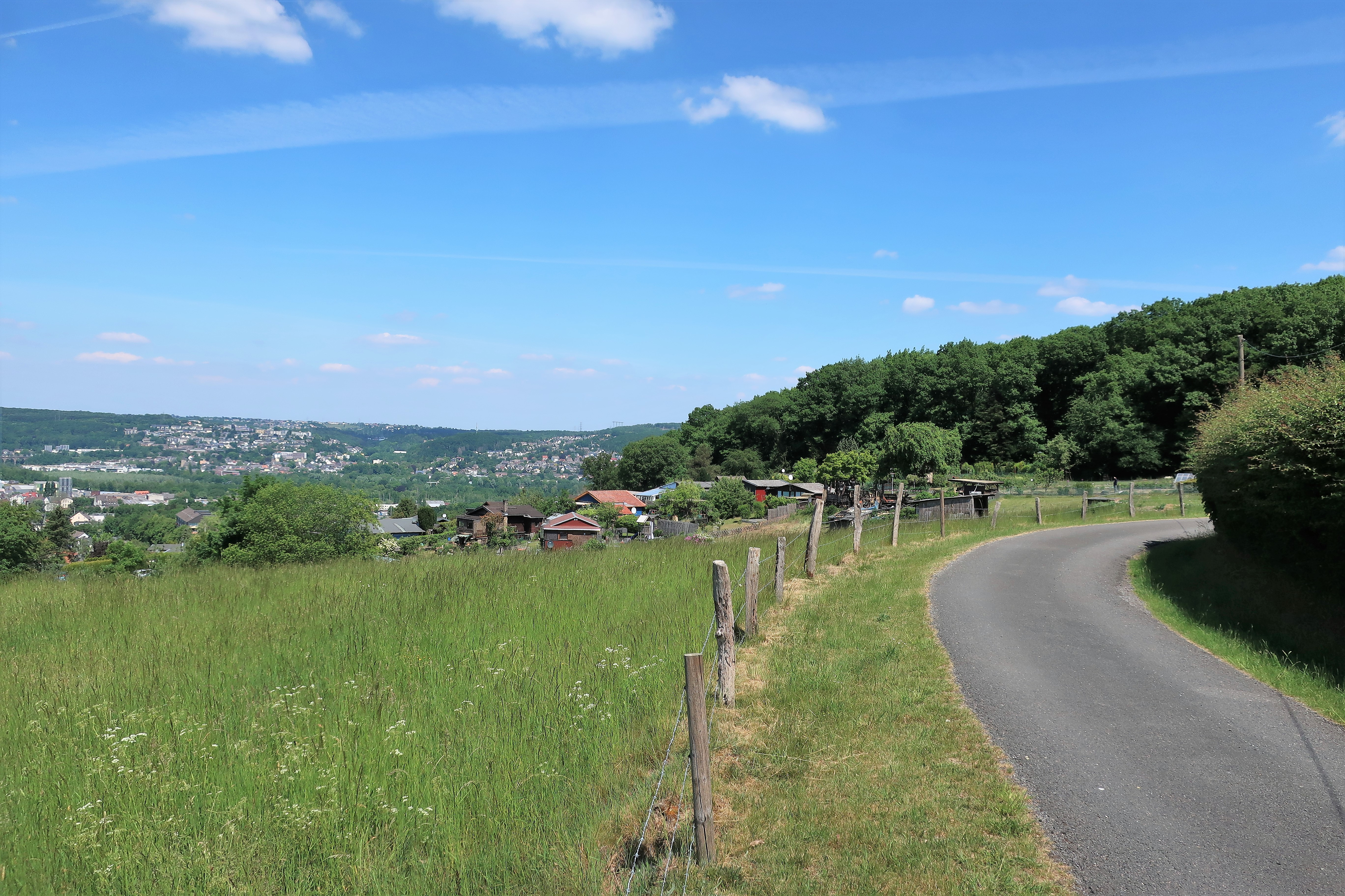 Geschützter Landschaftsbestandteil 1.4.2.21 „Feuchtgebiet In der Halle“ in Hagen, östlich vom Wolfskuhler Weg (Foto: links unterhalb der Wiese). Es handelt sich um vier künstlich durch Bachaufstauung geschaffene Teiche. Die Teiche sind eingezäunt und grenzen an eine Wochenendhaussiedlung.